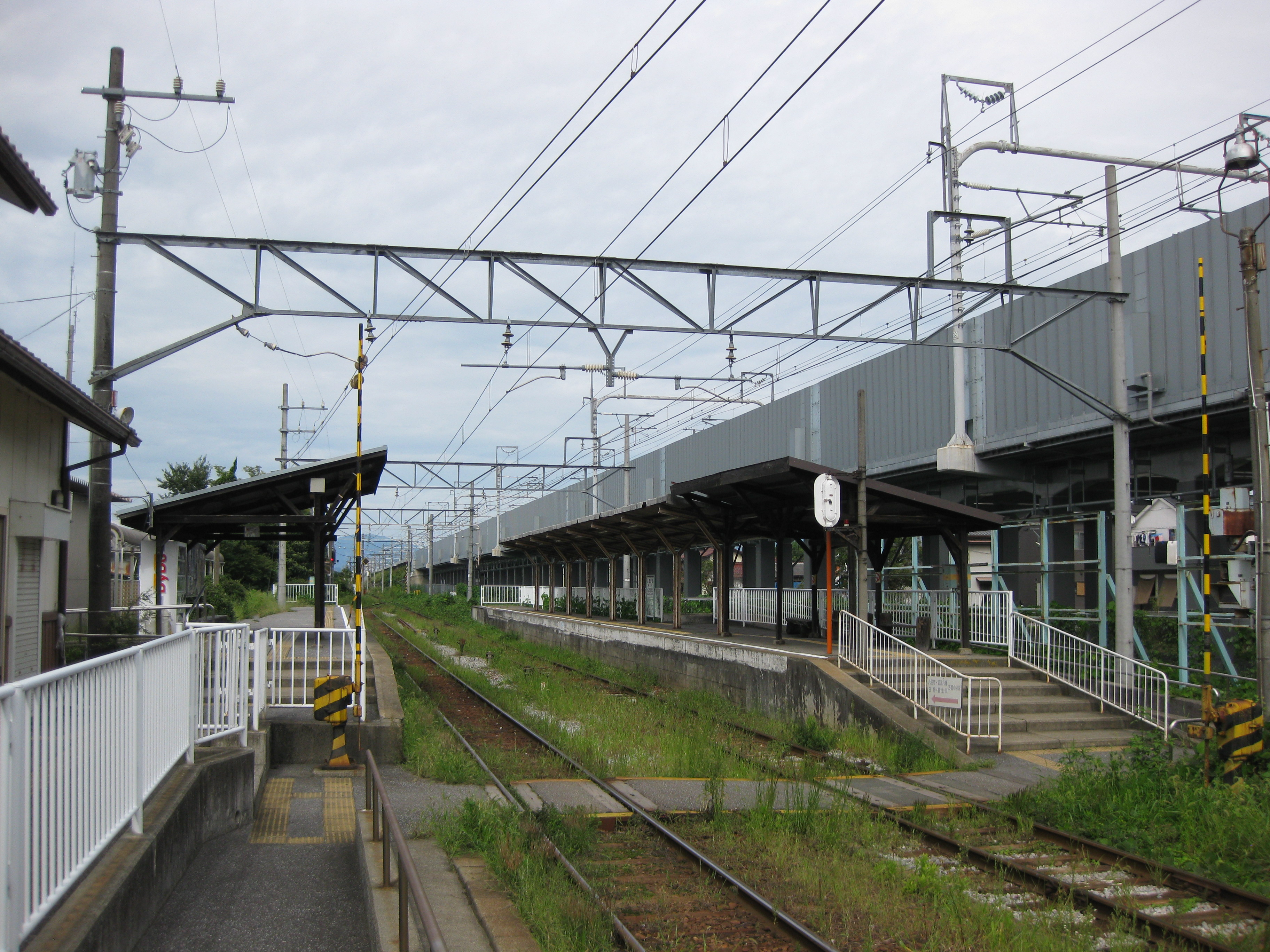 愛知川駅プラットホーム